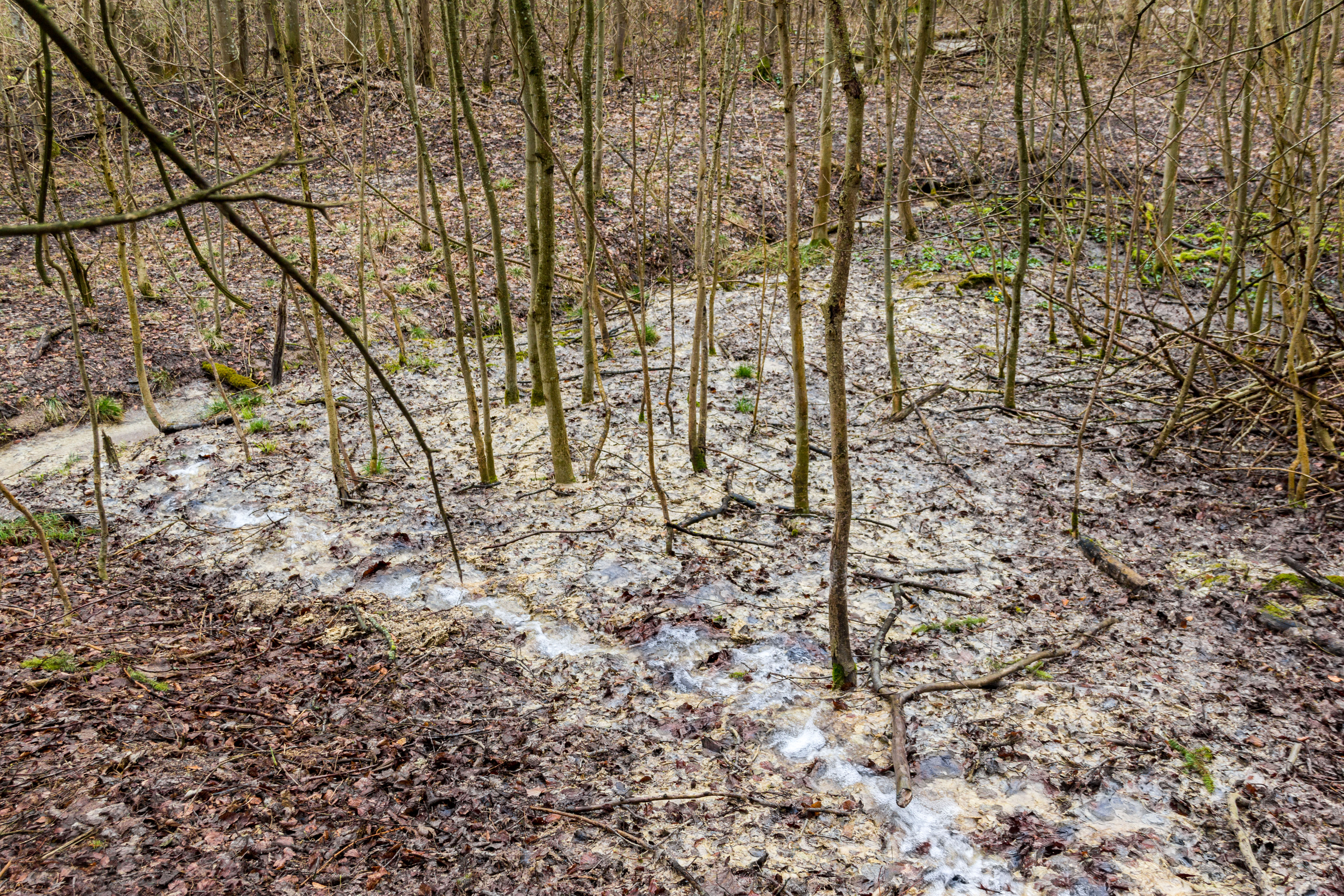 Steinerne Rinne, Buckmühle, Dittenheim, Geotop 577R003, Naturdenkmal